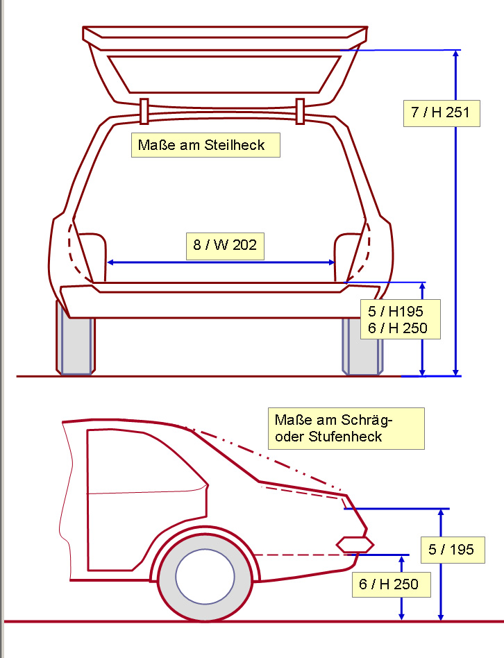 Kraftfahrzeugmaße nach DIN am Laderaum